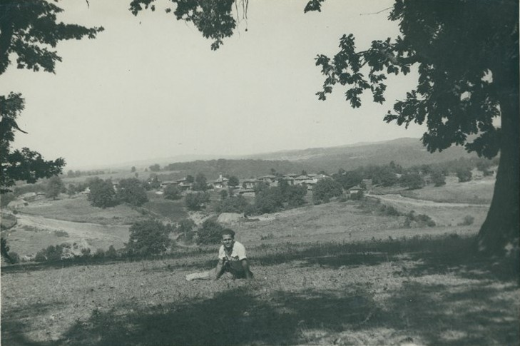 Изглед на с. Заберново, Бургаско.